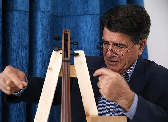 رونمایی از ساز جدید محمدرضا شجریان